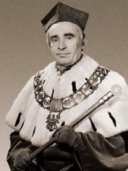 Zdzisław Kabza, rektor WSI w Opolu (1982-1987)